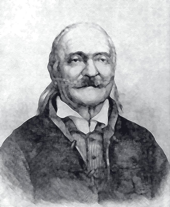 Портрет Тадеуша (Фаддея) Воланского